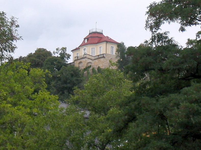 Radebeul, Mätressenschlösschen